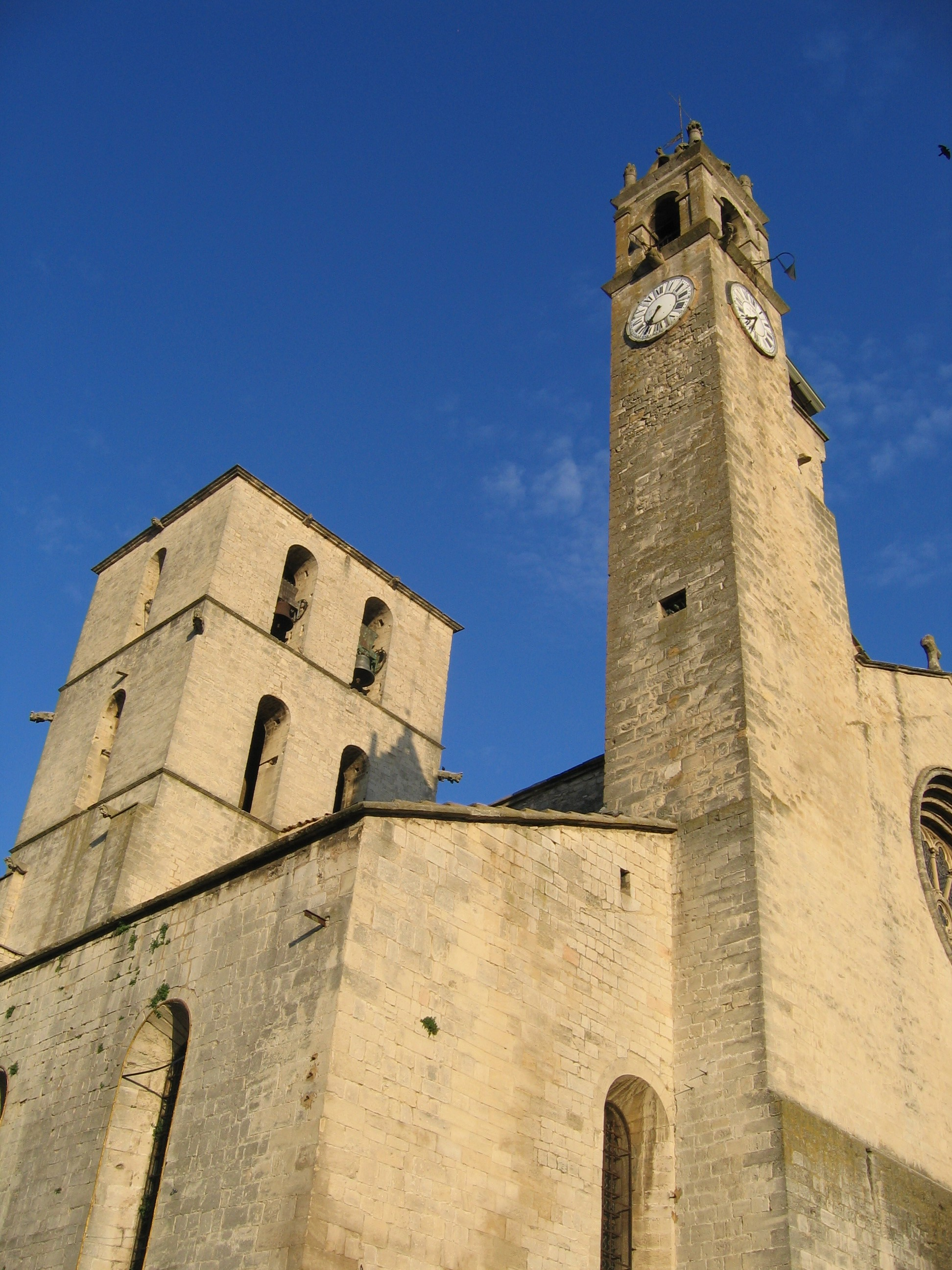 Vue générale de la Cathédrale Notre-Dame du Bourguet. Forcalquier.